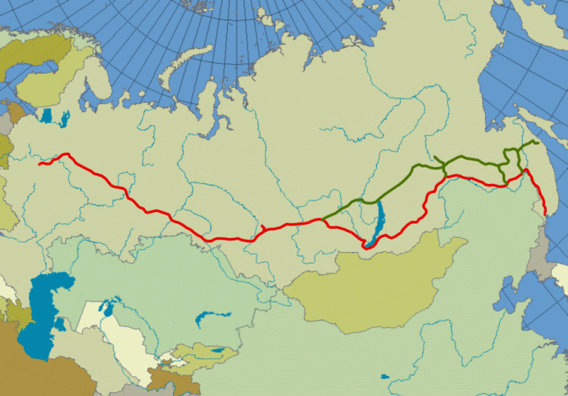 السكك الحديدية عبر سيبيريا (الحمراء)، والخطوط الرئيسية بايكال، آمور (الخضراء)